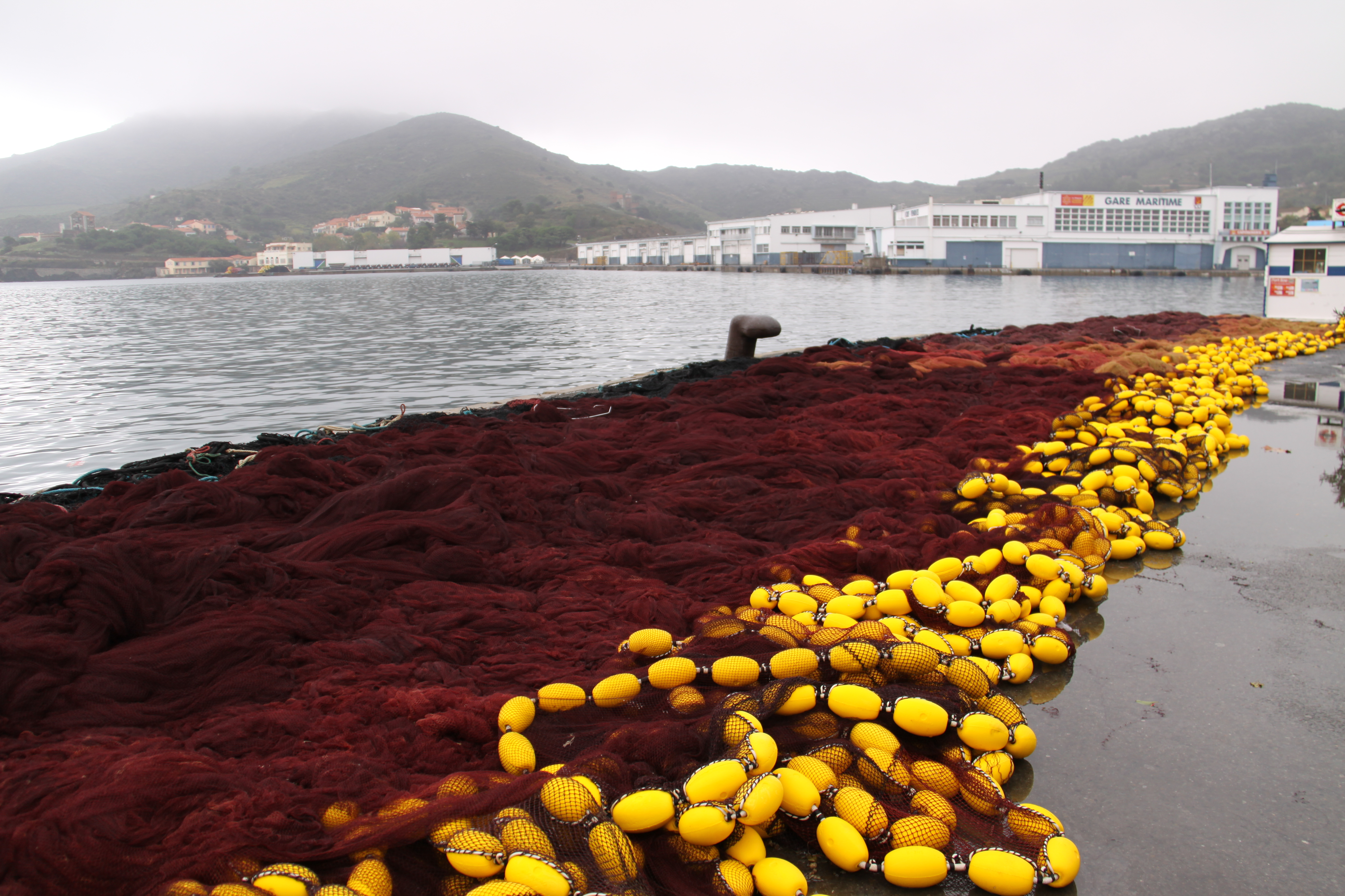 Une senne (filet de pêche) étendue pour réparation sur le Quai Jean-Moulin. Port-Vendres, Pyrénées-Orientales, France.